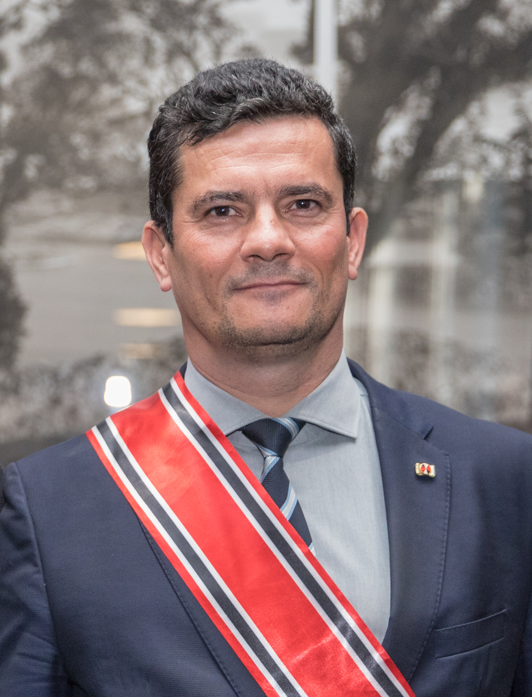 O governador do Estado de São Paulo, João Doria, participa de entrega de Medalha da Ordem do Ipiranga ao Ministro Sérgio Moro. Local: São Paulo/SP. Data: 28/06/2019. Foto: Governo do Estado de São Paulo